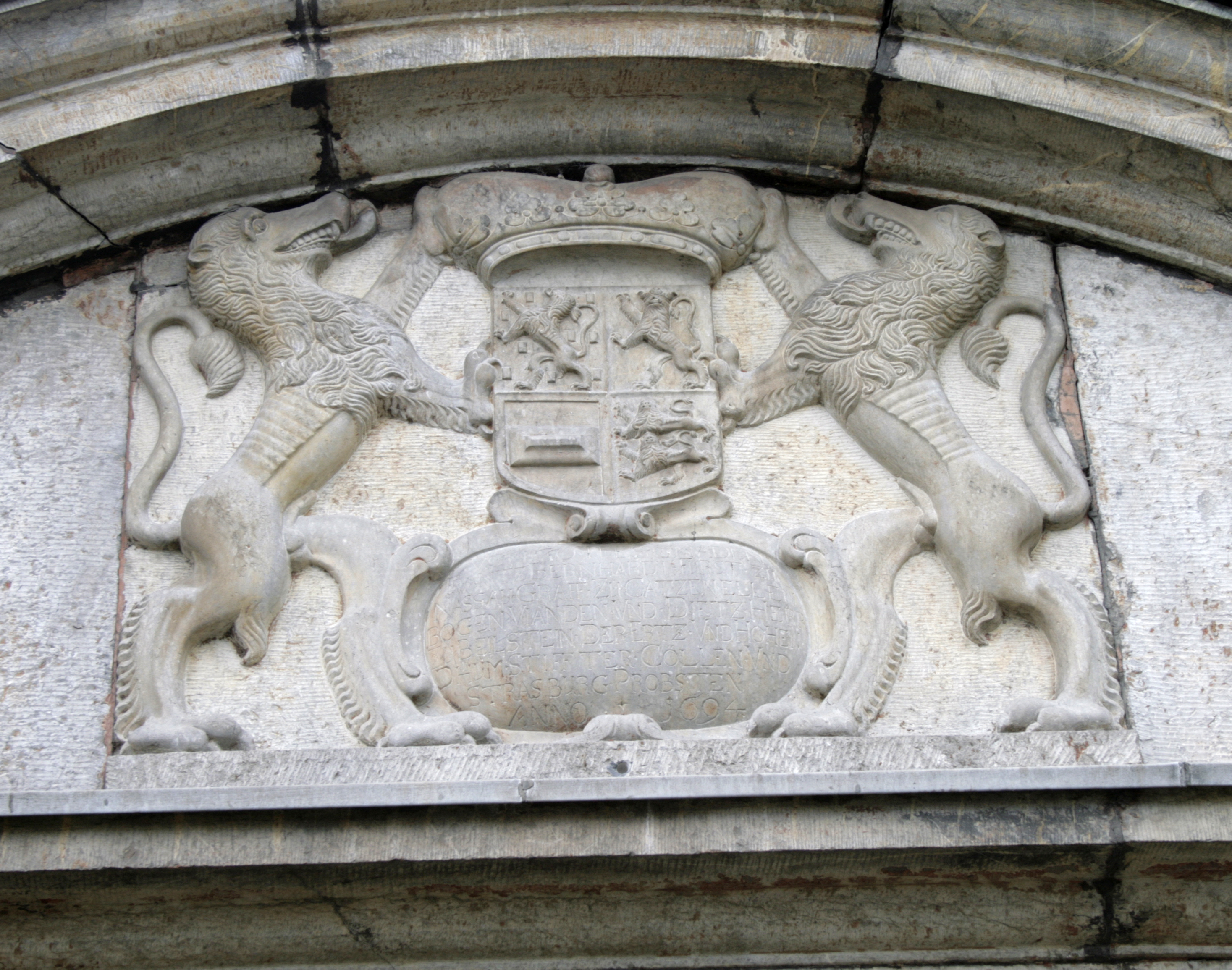 Schloss Hadamar, Wappen von Franz Bernhard von Nassau-Hadamar, Deutschland